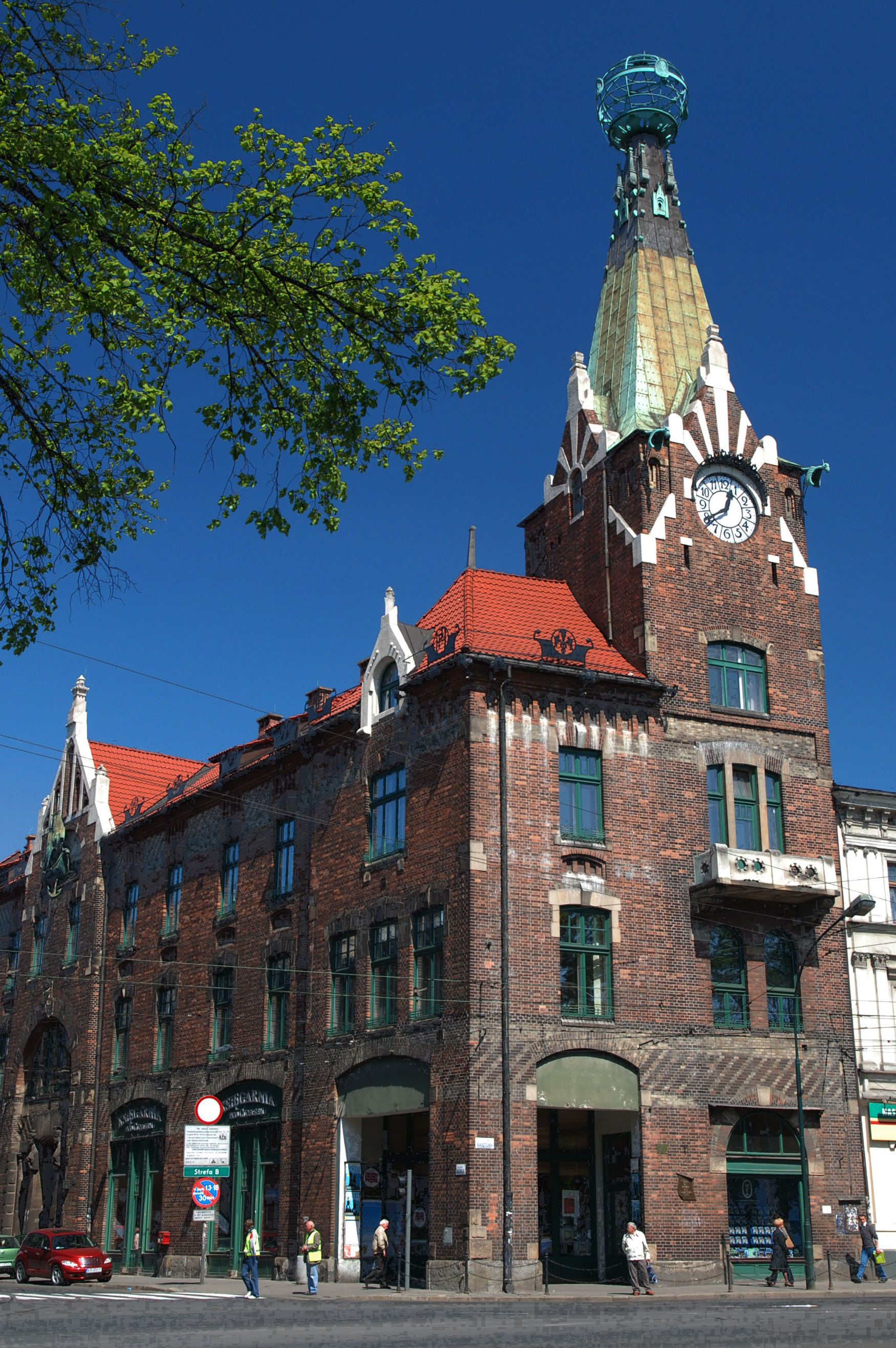 Dom pod Globusem. Kraków